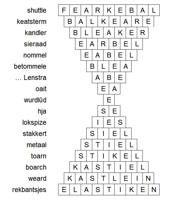 Friestalige zandloperpuzzel